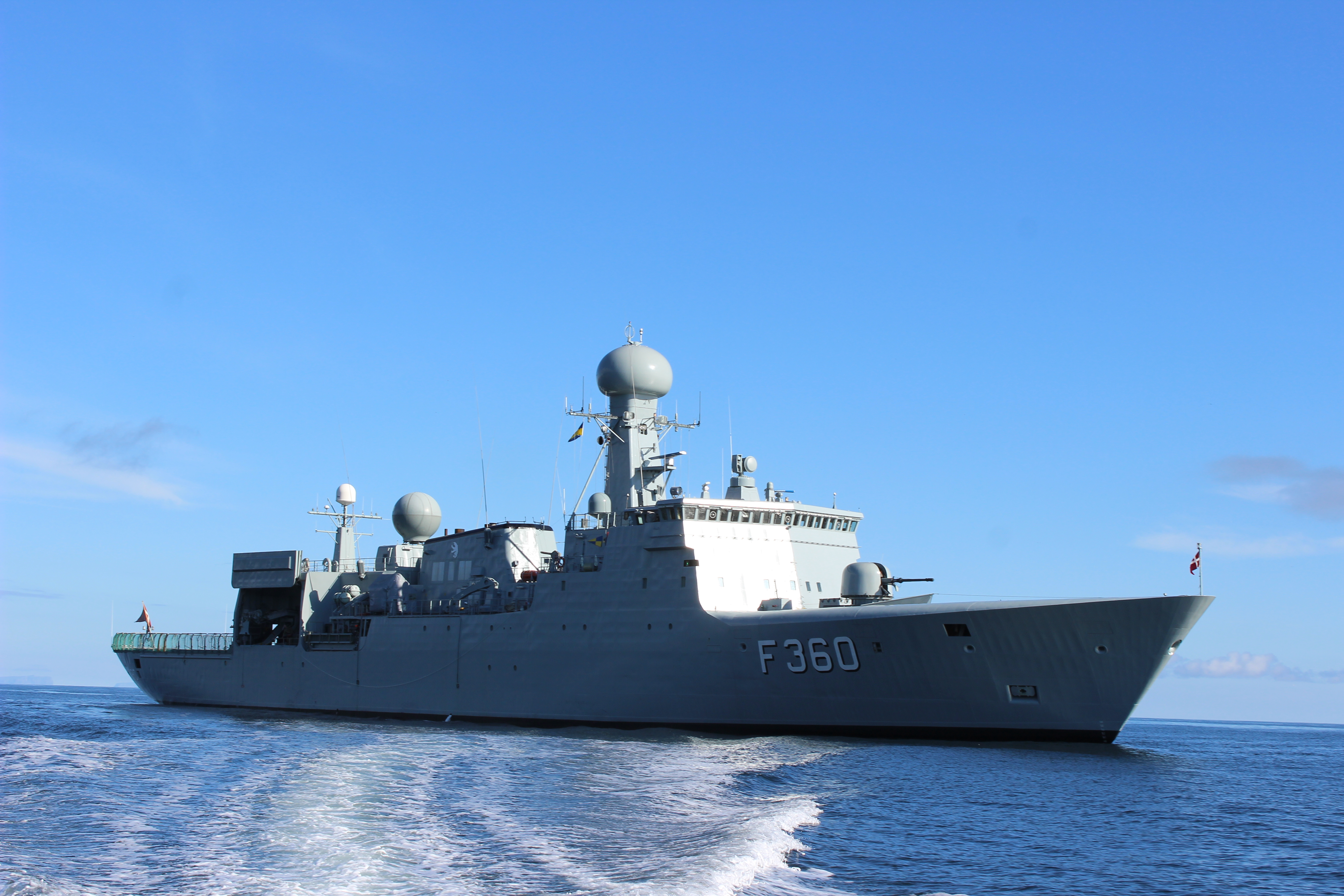 På patrulje ved Færøerne